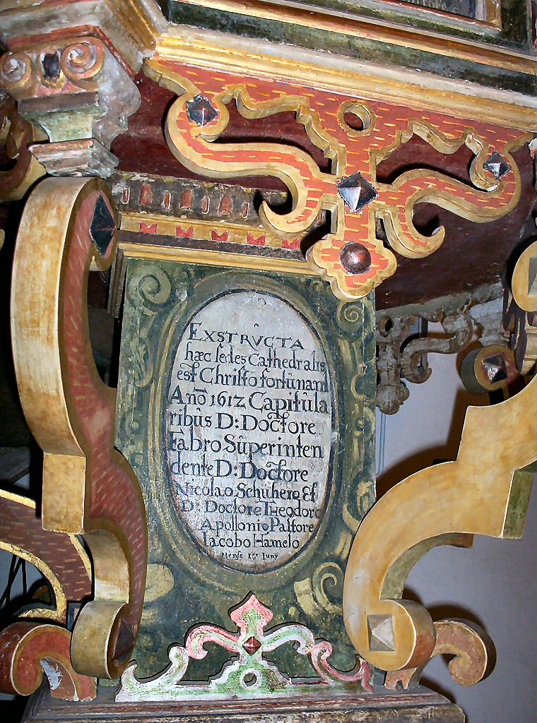 Kościół w Brzesku koło Pyrzyc - ambona